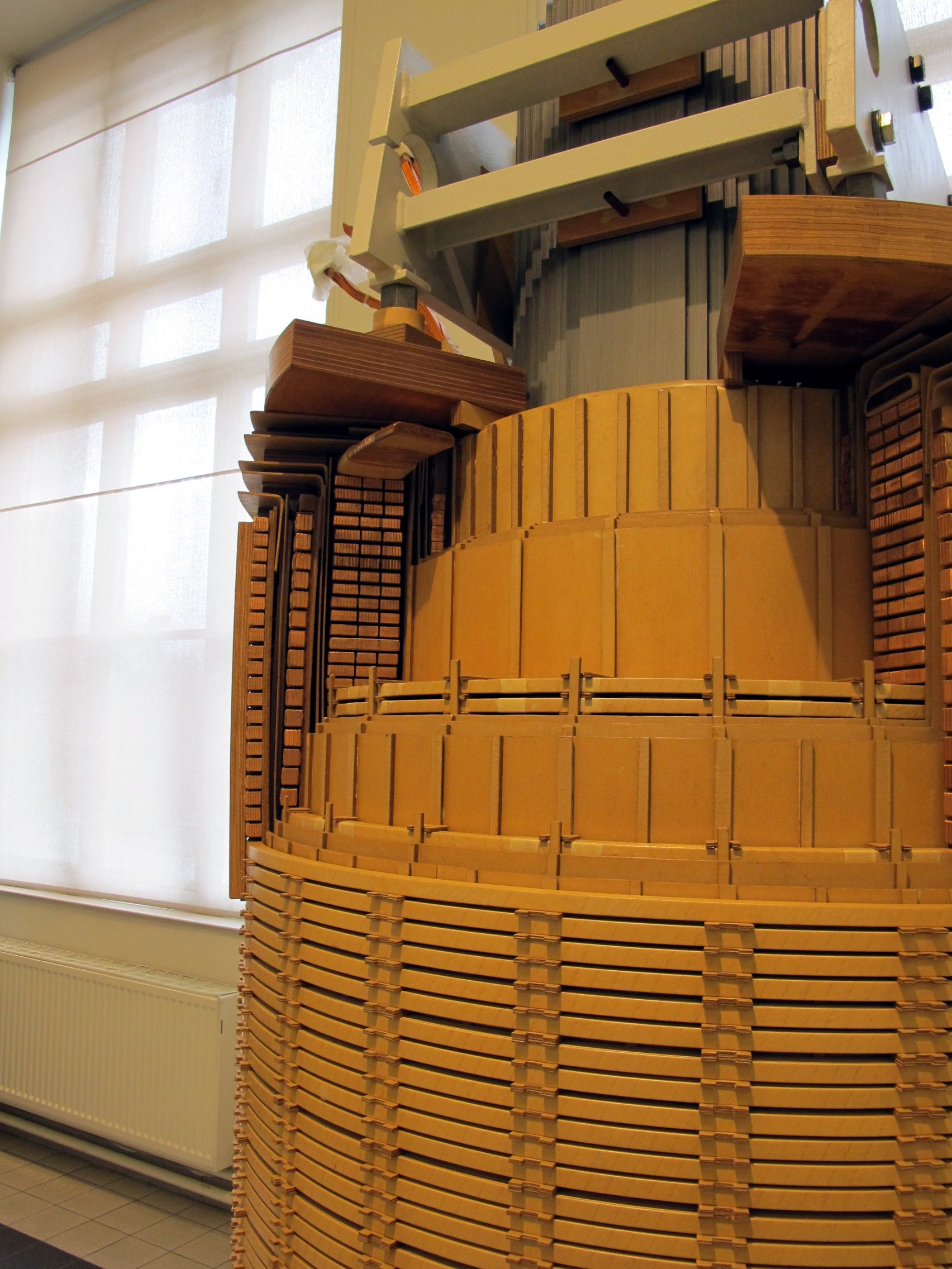 Außenschenkel eines dreischenkeligen Leistungstransformators für Drehstrom. Der in der Mitte befindliche Eisenkern besteht aus gegeneinander isolierten (geschichteten) Trafoblech. Der Eisenquerschnitt wird durch Abstufungen an die kreisförmige Querschnittsform angepasst. Die Unterspannungswicklung (Mitte) ist zylinderförmig ausgeführt, die aussen befindliche Oberspannungswicklung ist spulenförmig angeordnet. Als innerste und kleinste Wicklung ist eine Tertiärwicklung zur Kompensation von Schieflasten angebracht. Die Wicklungen bestehen aus Kupferschienen und sind durch Isoliermaterialien getrennt. Im Betrieb befindet sich drei dieser Schenkeln in dem vollständig mit Isolieröl gefüllten Transformatorgehäuse. Oberspannungseite: 110 kV mit maximal 210 A Unterspannungseite: 10 kV mit maximal 2179 A Gesamtleistung des Trafos: 40 MVA Baujahr: 1999 Hersteller: VA Tech Elin EBG GmbH